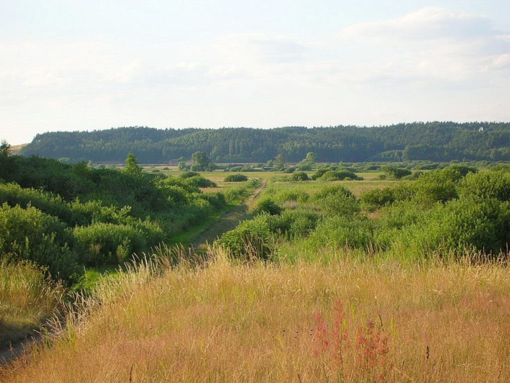 Dolina Środkowej Noteci i Kanału Bydgoskiego - widok z krawędzi południowej w Łochowie